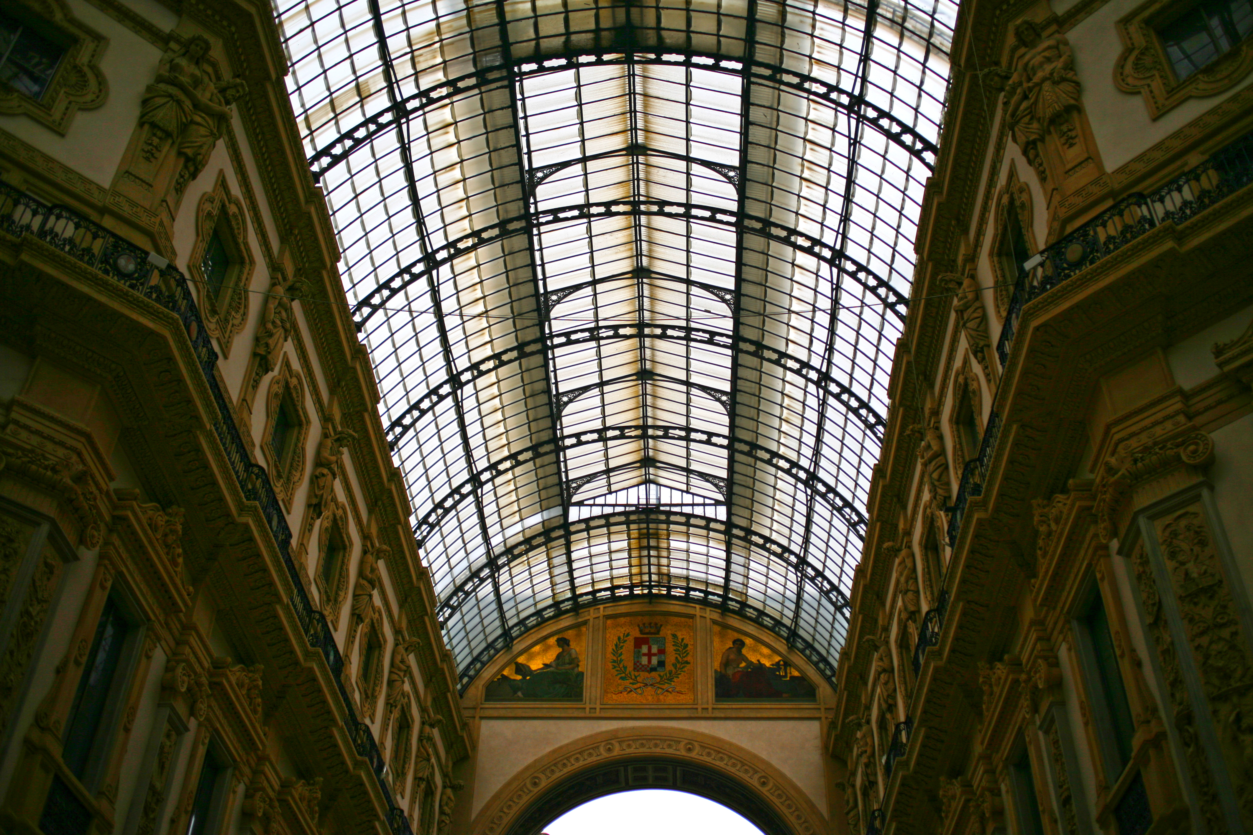 Galleria di Milano,dettagli interno, vetrata e decorazioni 3